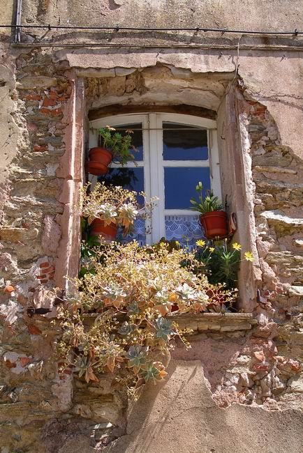 Typisch Fenster in der Provence.